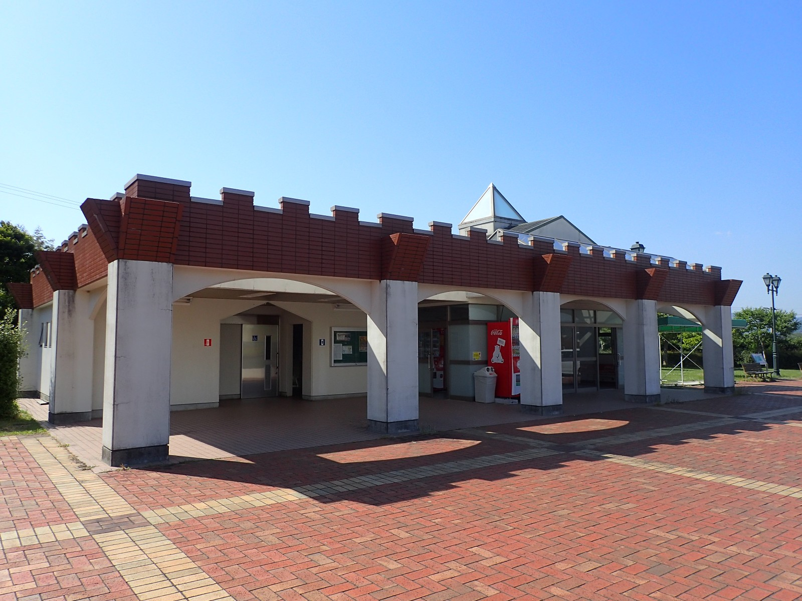 高畑P.A.（上り）